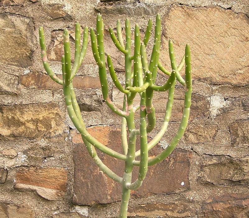 Euphorbia cedrorum